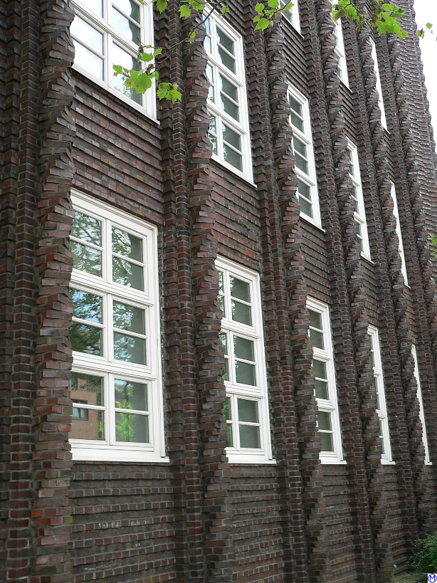 Klinkerdetails am Beispiel der cigarettenfabrik Reemtsma, Hamburg, Walddöferstraße, 22.5.2005 Architekt: Fritz Höger